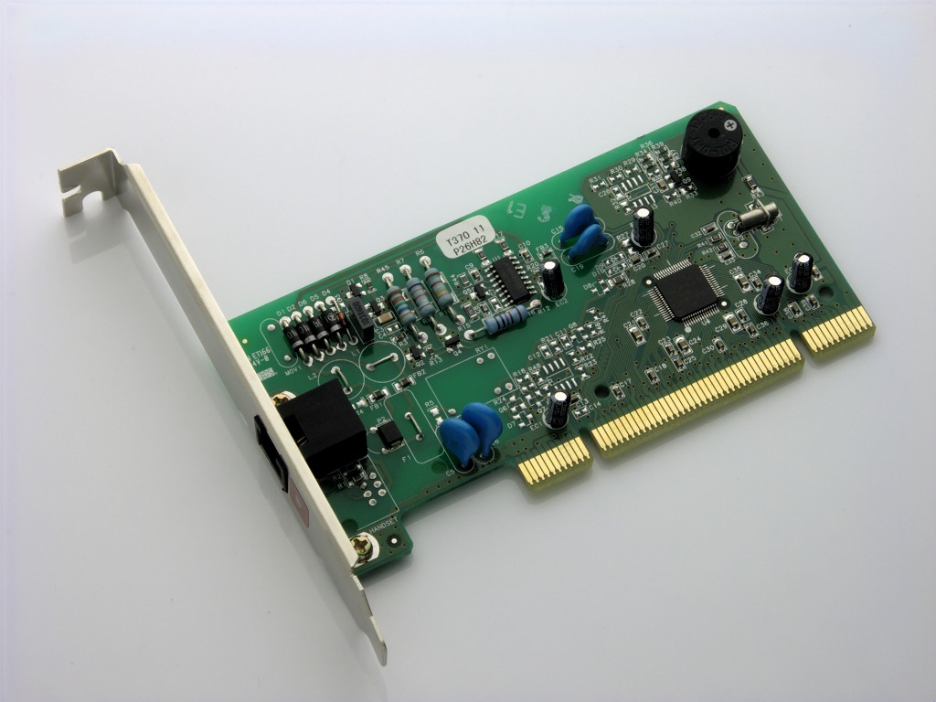 Descripción: Módem interno 56k SmartLink (Tarjeta PCI) Fecha: 31/07/2006 Hora: 16:18 Cámara: DiMAGE A2 ISO: 64 Tv: 1 Av: 11 Autor: aTarom